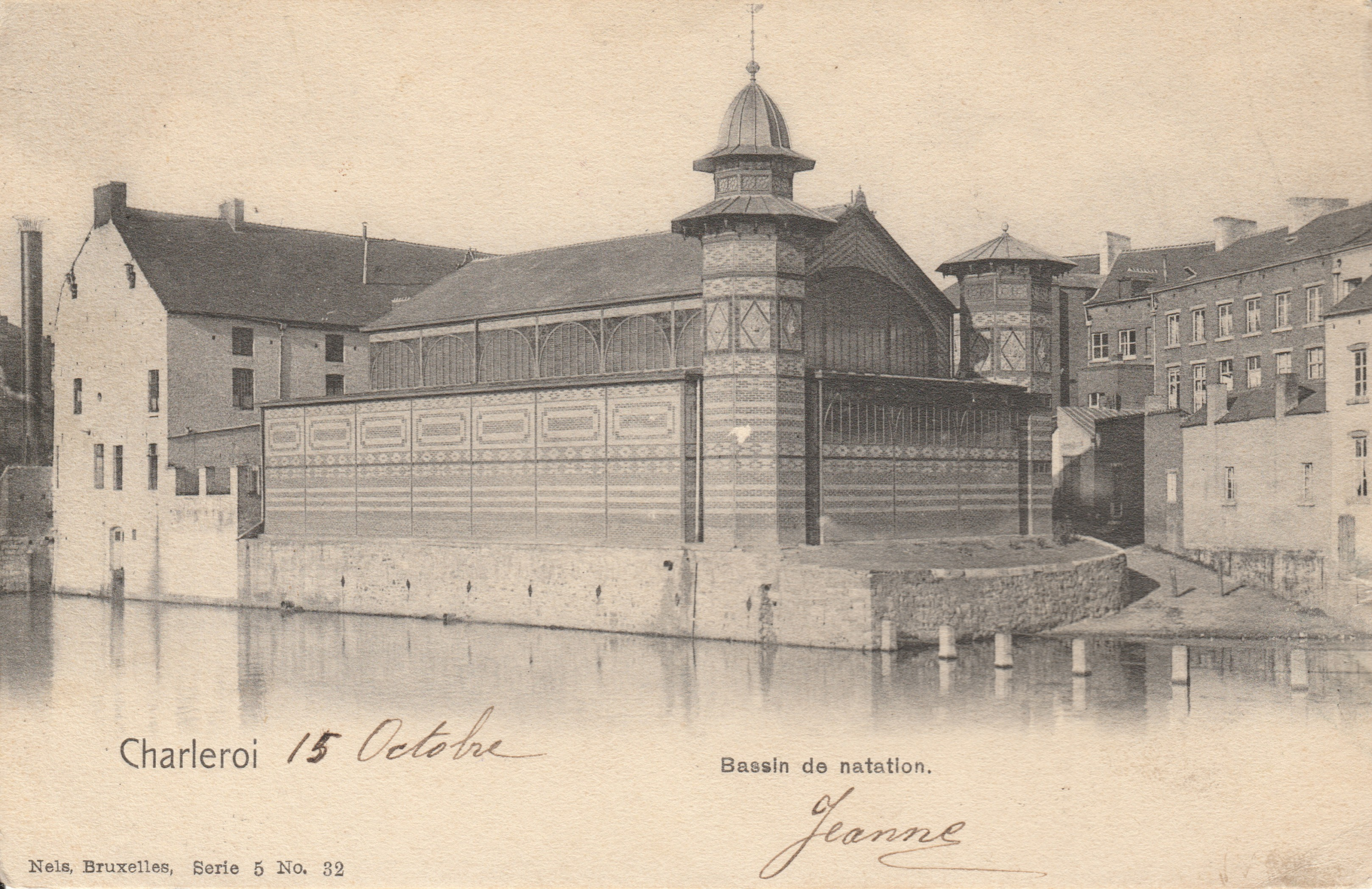 Charleroi (Belgique) - La Sambre et l'ancien bassin de natation. Carte postale Nels publiée au début du 20e siècle (cachet de la poste : 14-10-1909). Recto.